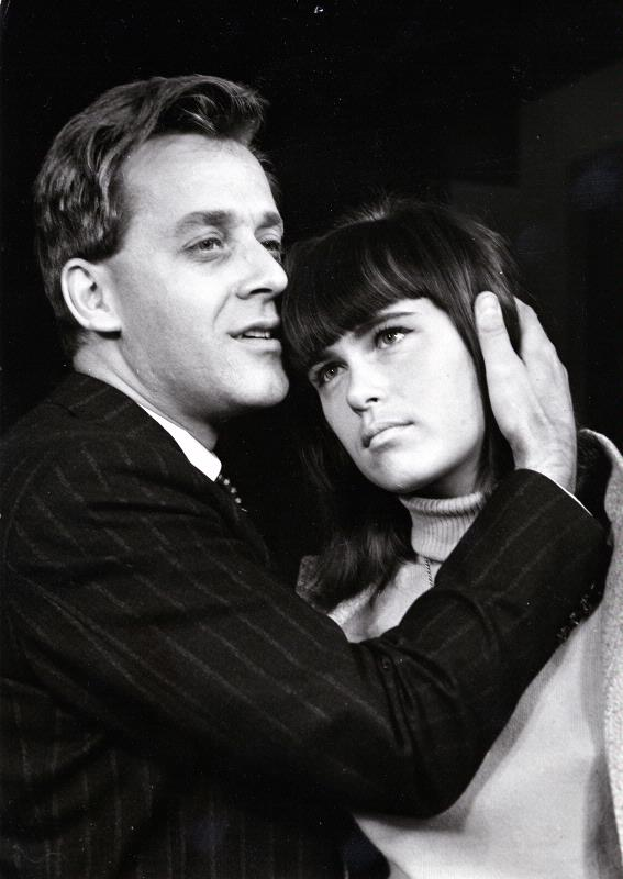 Per Sjöstrand och Birgitta Nord i Vittne mot sig själv på Helsingborgs stadsteater.